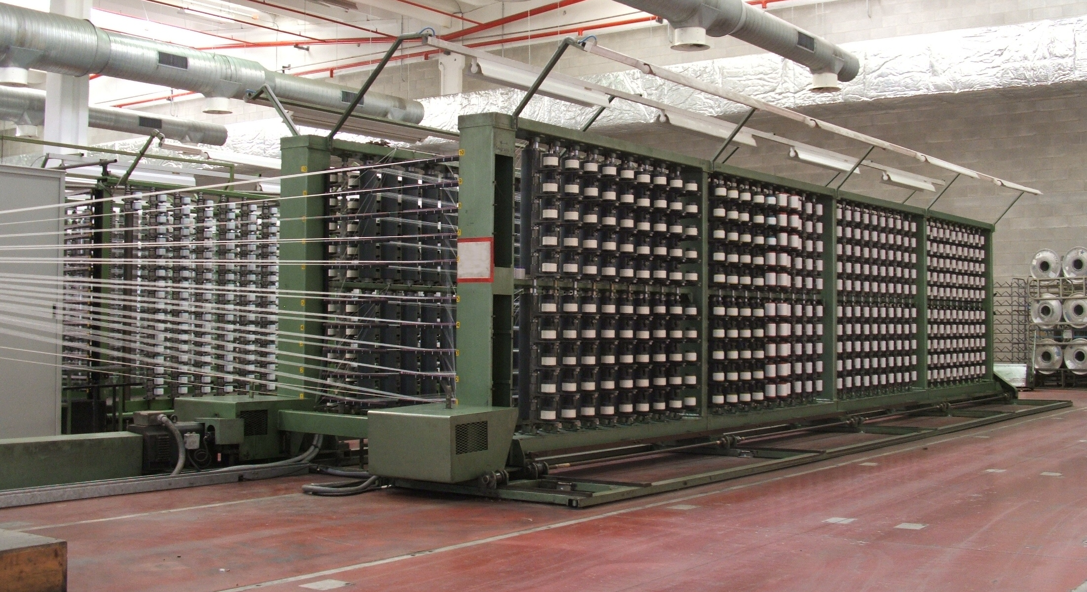 Cantra